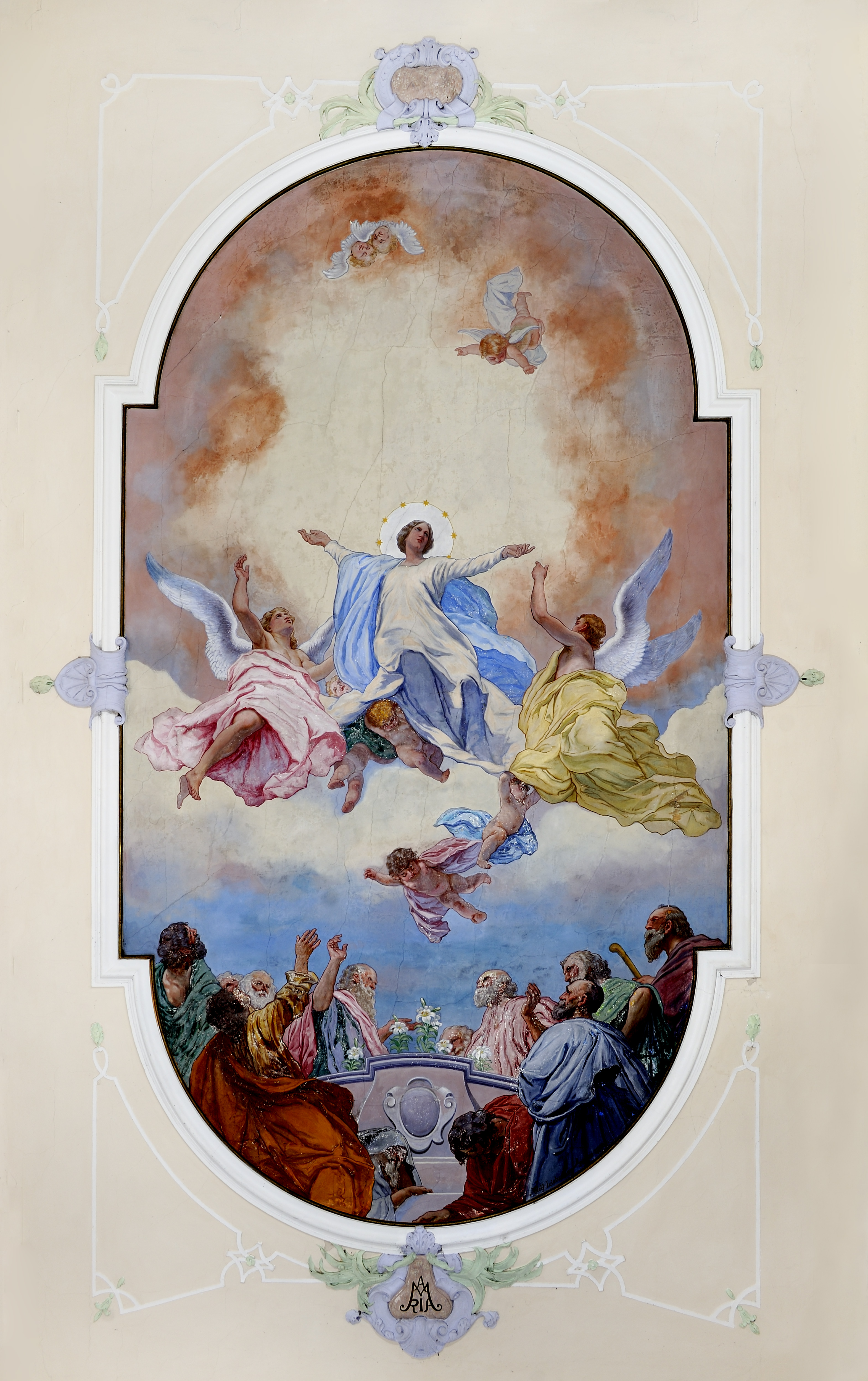 Kostel svatého Jakuba Většího, Ratenice. Nástropní freska „Nanebevzetí Panny Marie“ od Adolfa Liebschera z roku 1912.